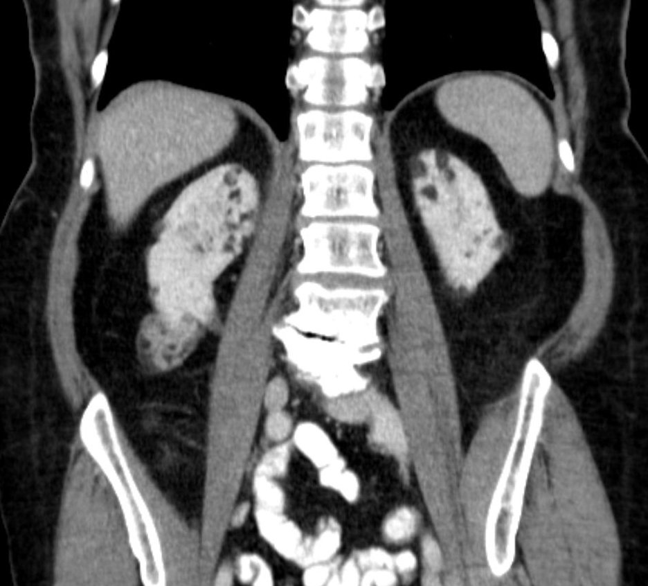 Computertomographie: Multiple Angiomyolipomen der Nieren bei Patientin mit CT-Bild einer Lymphangioleiomyomatose der Lunge: Dringender Verdacht auf Tuberöse Sklerose.